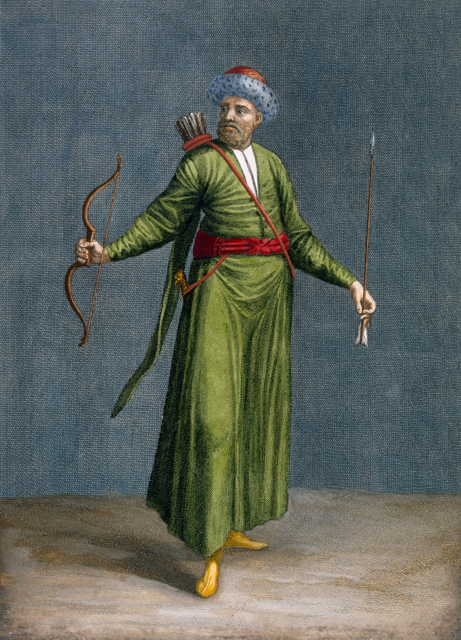 Житель Крымского ханства, 1700 год